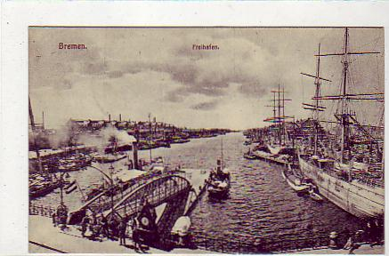 1918 Old images